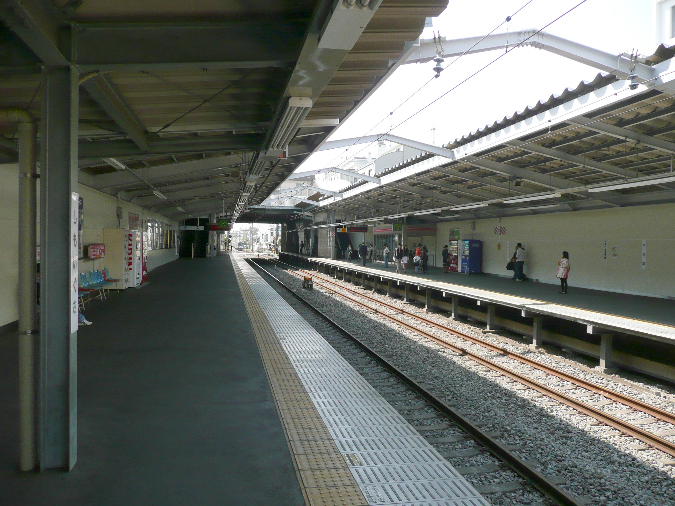 下井草駅ホーム